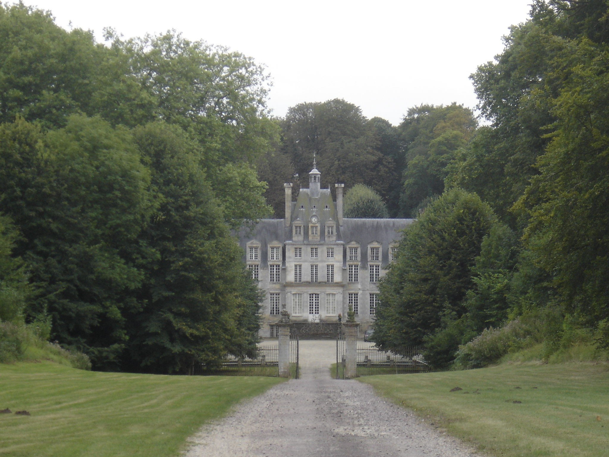 Le château de Manneville à Lantheuil dans le Calvados a été construit au XVIIè siècle par la famille du ministre Turgot .